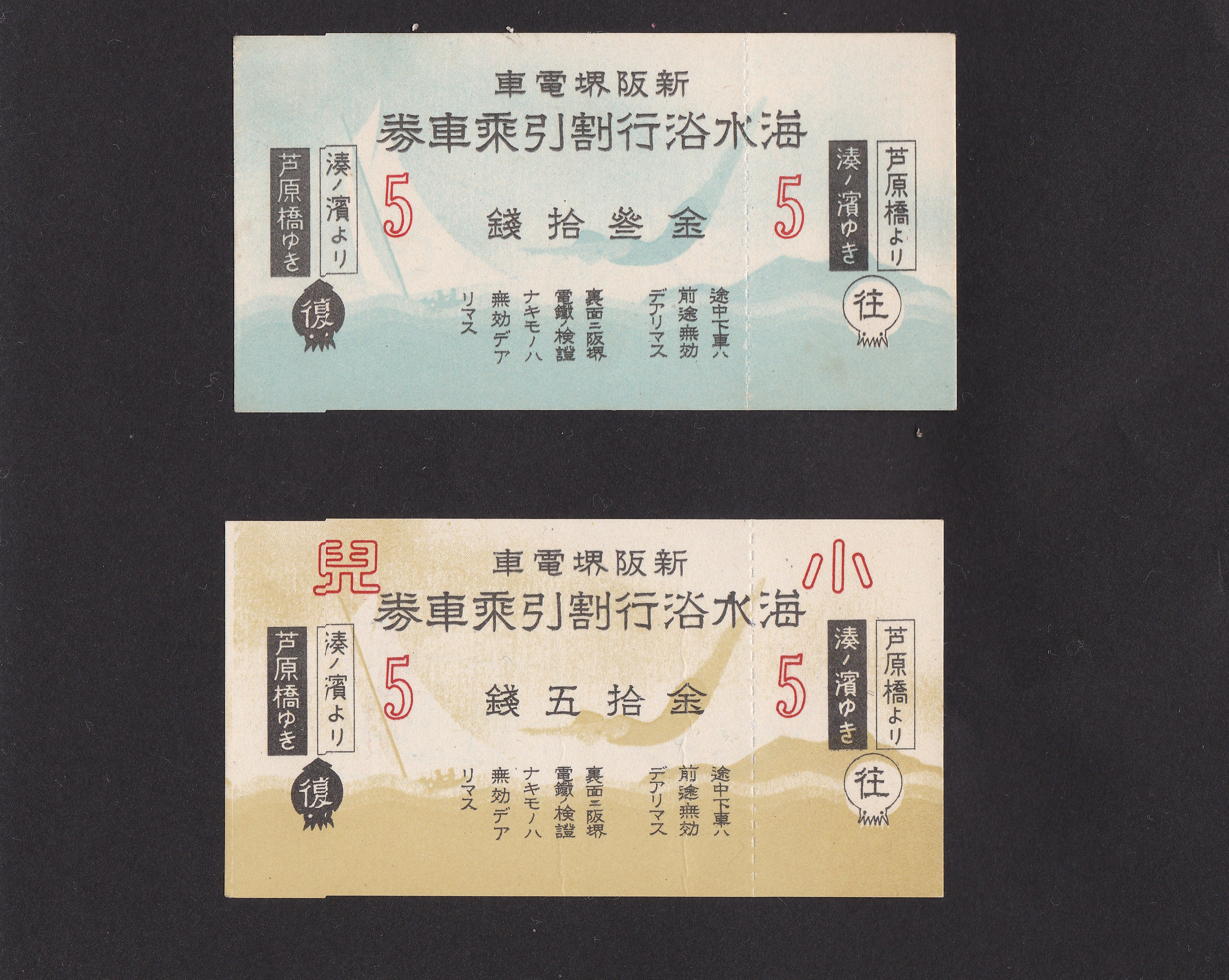 大阪の芦原橋～浜寺間を走っていた阪堺鉄道（現在の阪堺電気軌道とは別企業）の「海水浴行割引乗車券」。有効区間は芦原橋～湊ノ浜間、発行年不明。